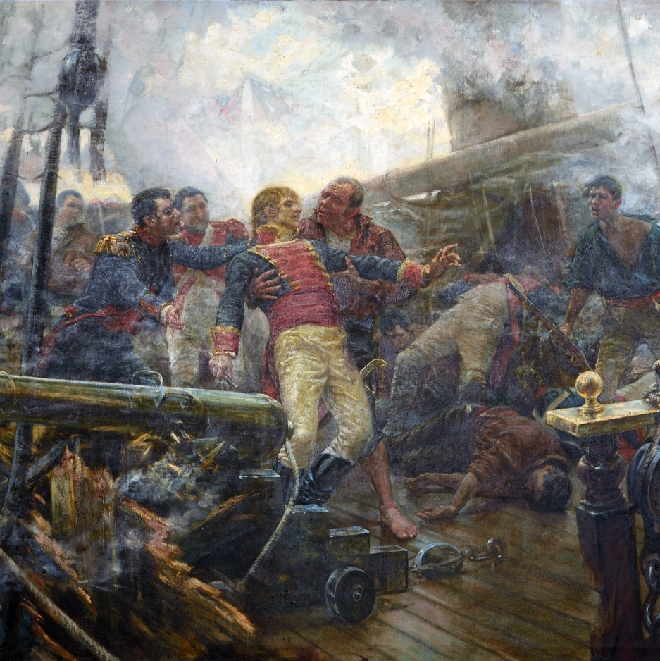 La obra representa la muerte del brigadier español Cosme Damián Churruca (1761-1805), que murió durante la batalla de Trafalgar cuando comandaba el navío de 74 cañones San Juan Nepomuceno.